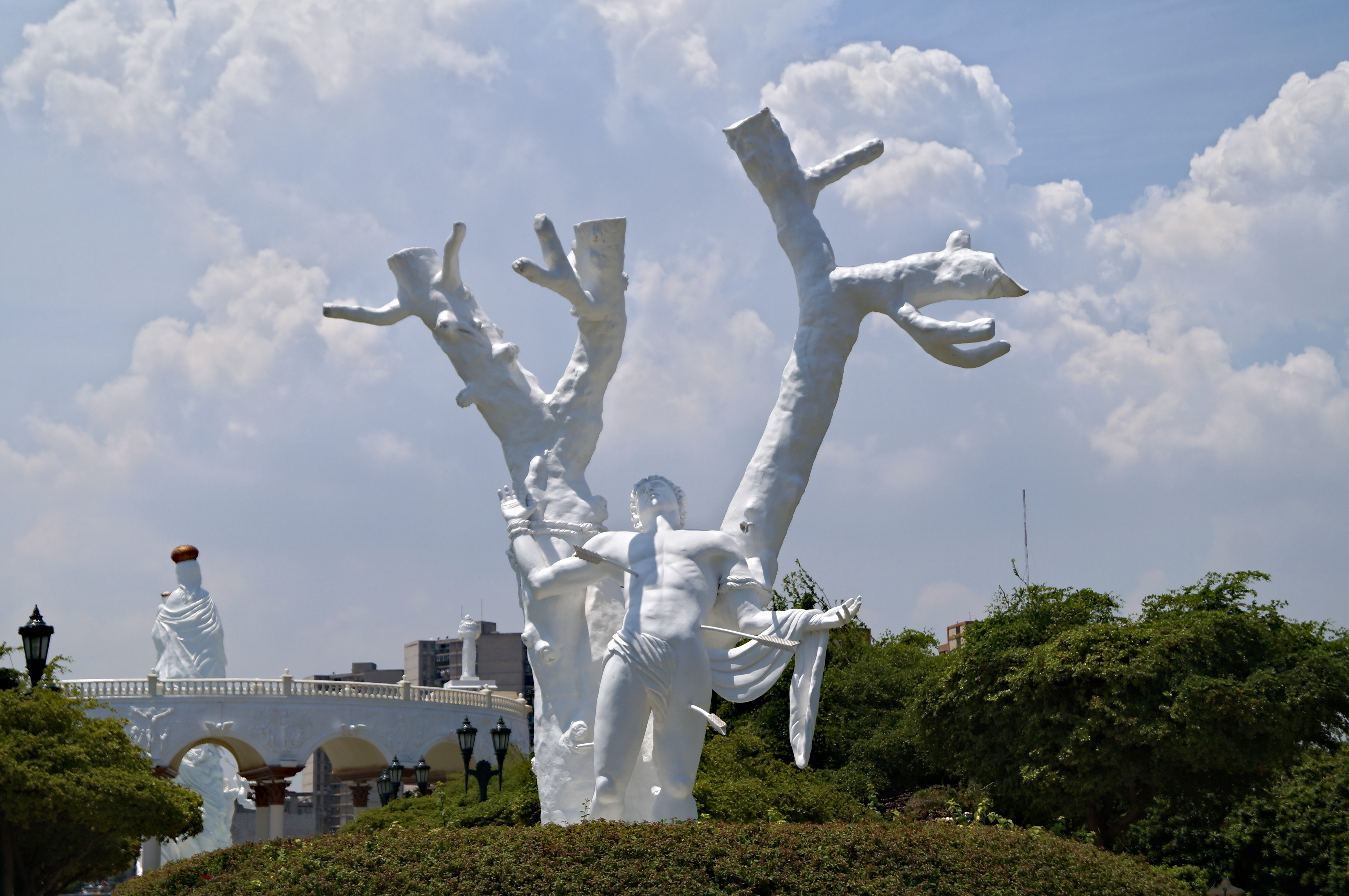 En la actualidad, está escultura de San Sebastián (mártir) se encuentra en el monumento a la Virgen de Chiquinquirá conocido anteriormente como Paseo Ciencias (Centro de la ciudad de Maracaibo), frente a la iglesia Sta. Barbara. San Sebastián (mártir) sirvió a los maracaiberos para pedirle protección ante las epidemias de cólera que azotaron al país en siglos anteriores (XVIII-XIX), algo que al parecer sí tuvo el efecto deseado.